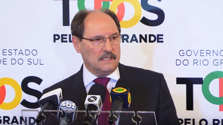 José Ivo Sartori anuncia a 4ª fase do ajuste fiscal gaúcho.